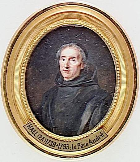 Yves-Marie André, dit le Père André, né à Châteaulin en 1675 et mort à Caen en 1764 fut un jésuite, philosophe et écrivain français.